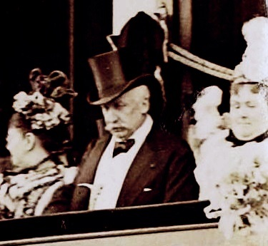 [Collection Jules Beau. Photographie sportive] : T. 7. Année 1898 / Jules Beau : F. 12. [Grand Prix de Paris, 5 juin 1898], Félix Faure